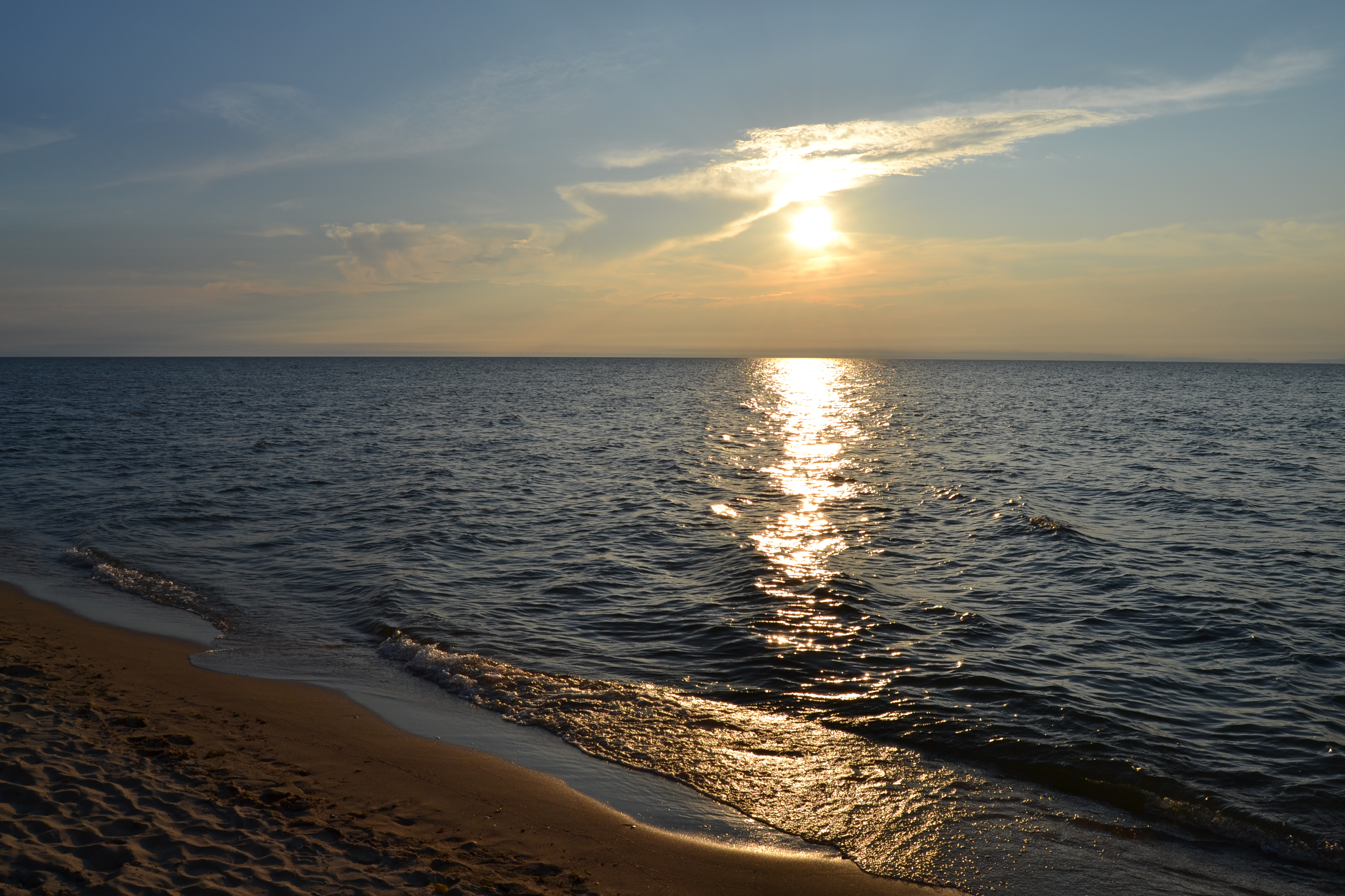 Вечерний пейзаж Байкала